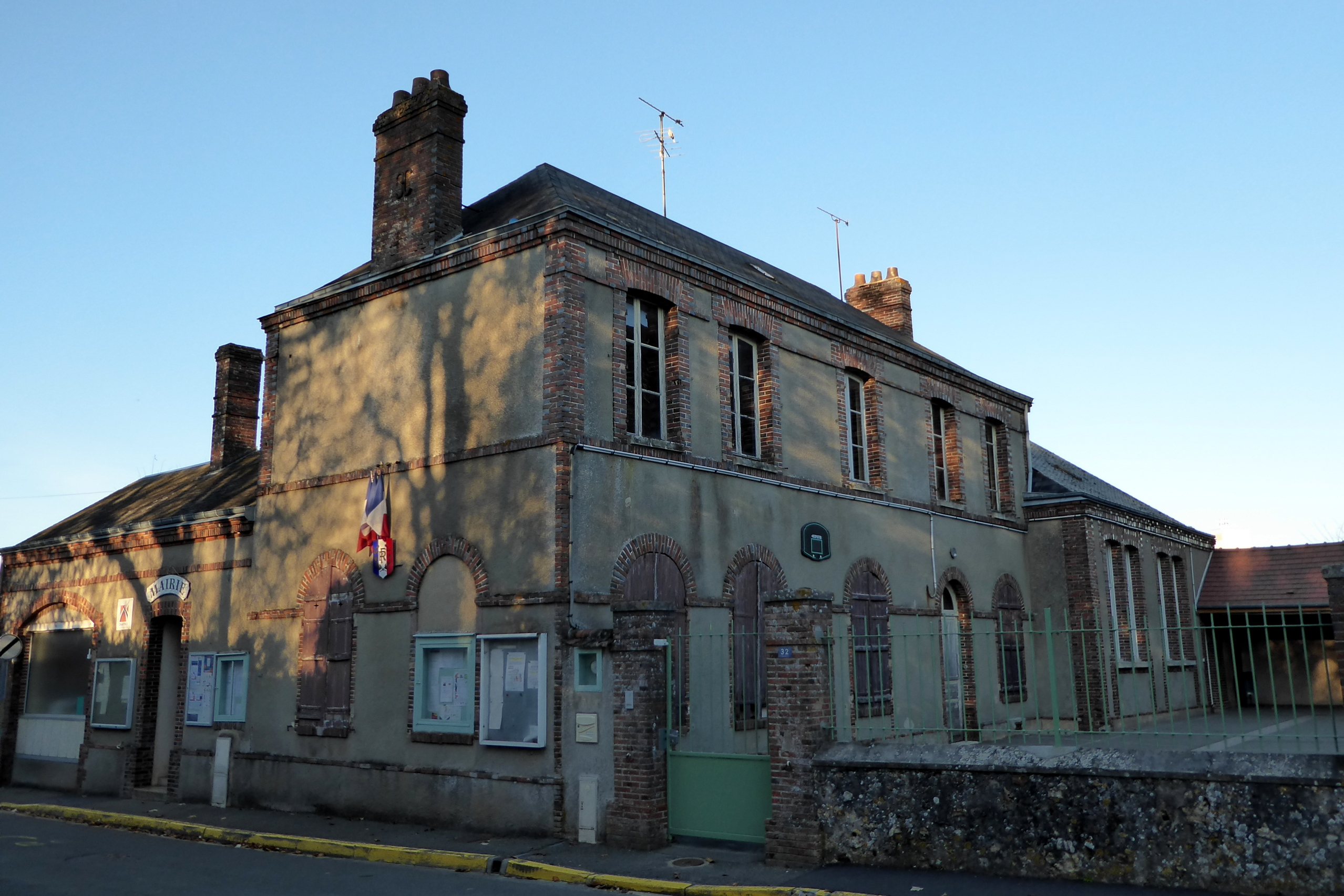 Mairie-école de Poisvilliers, Eure-et-Loir (France).